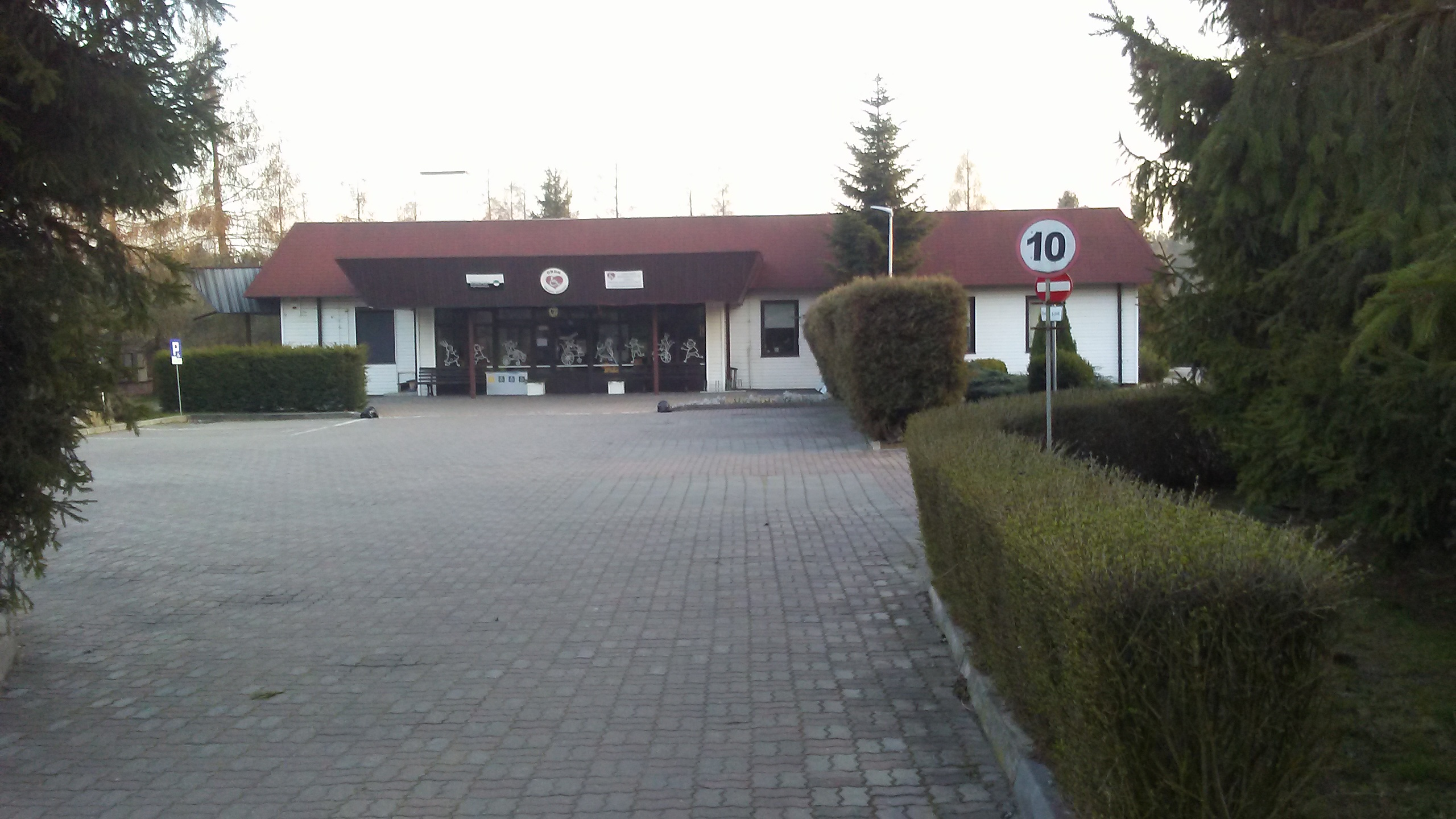 Ośrodek Rehabilitacji Dzieci Niepełnosprawnych (ORDN) w Tomaszowie Mazowieckim, ulica Jana Pawła II 64